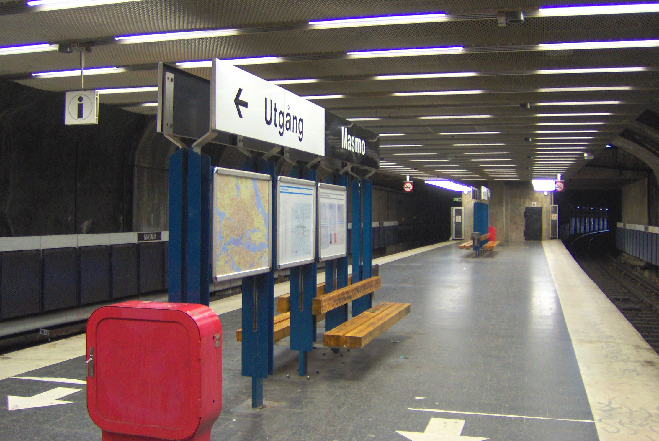 Masmo Tunnelbanestation, sydvästra Storstockholm.